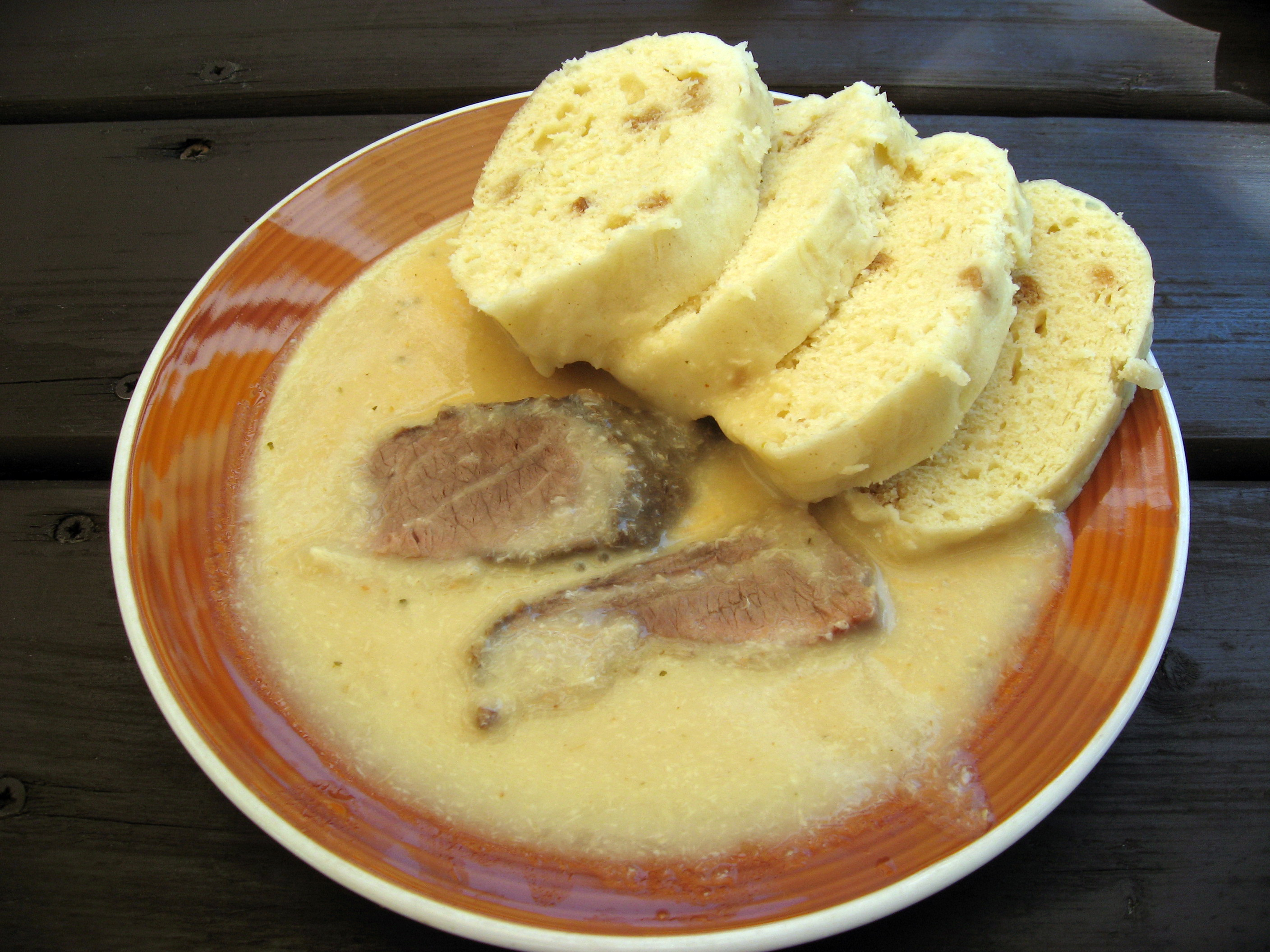 Hovězí maso, křenová omáčka, houskový knedlík